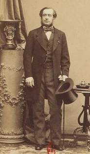 Alphonse de Rayneval [Recueil. Personnalités diverses du Second Empire]